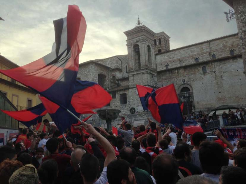 Festa in Piazza Garibaldi per la vittoria del campionato di Eccellenza 2012-13